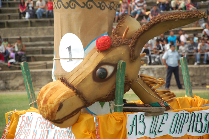 Талисман на био-рали в Гурково